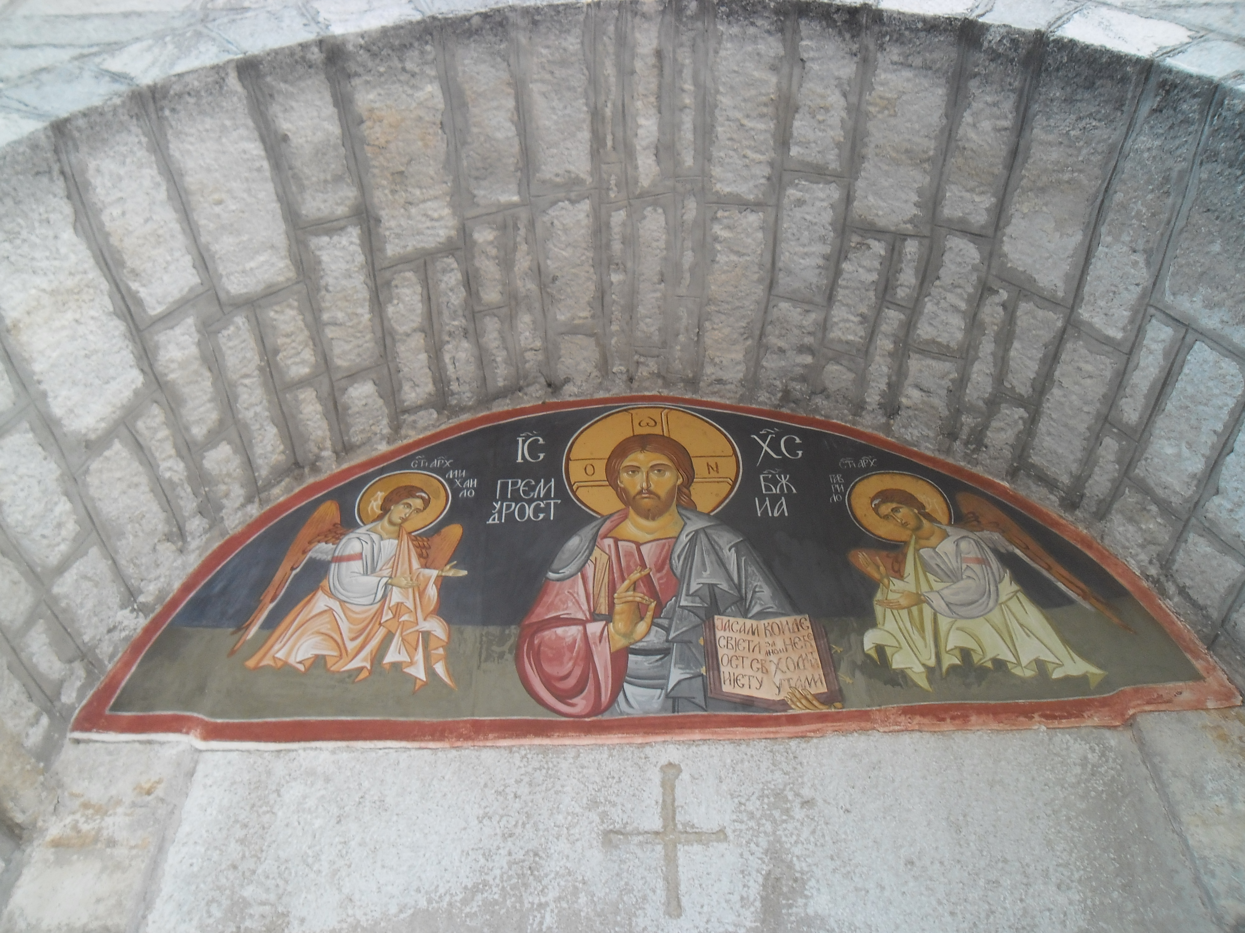 Cetinje